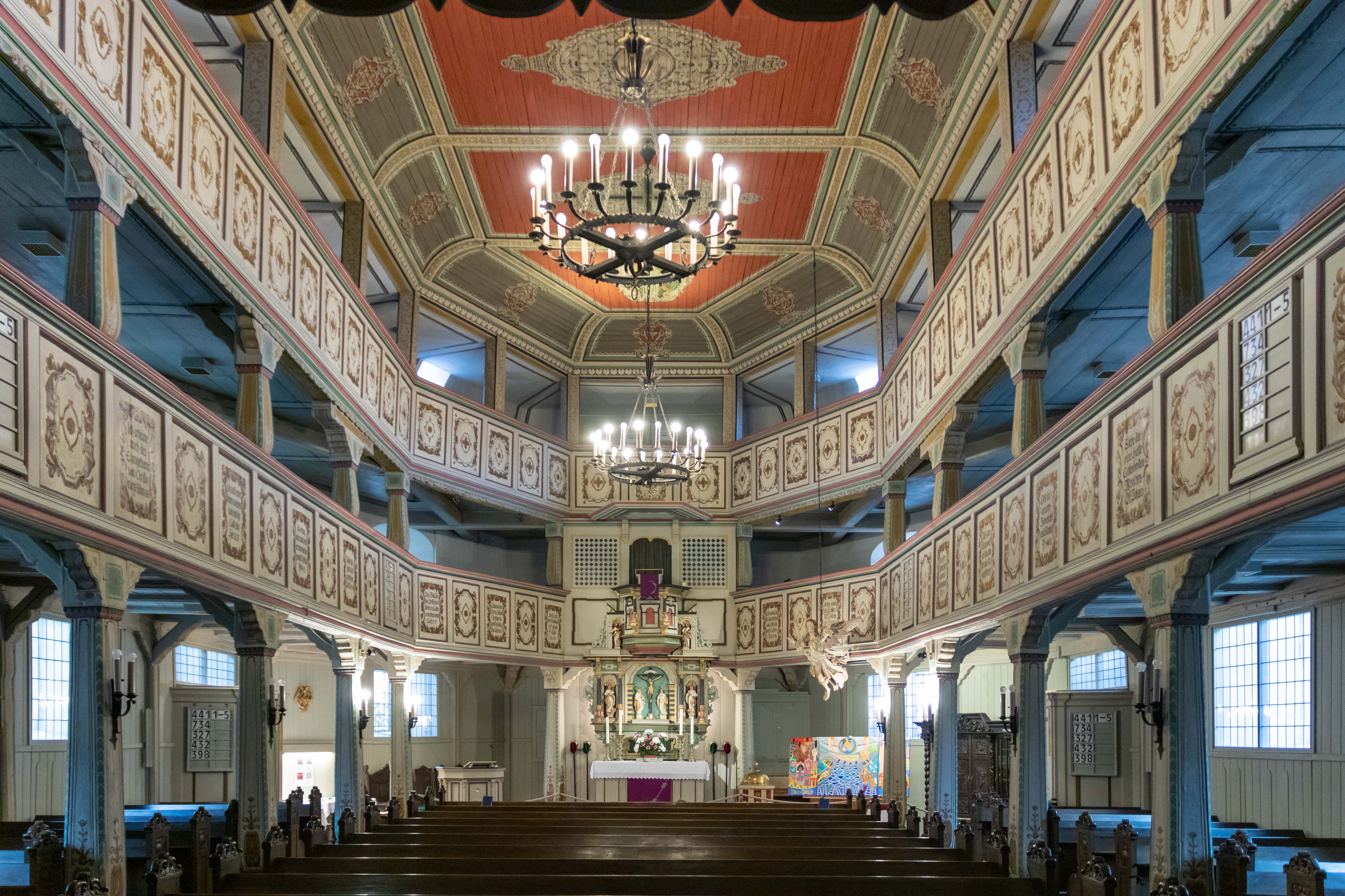 Die evangelisch-lutherische Kirche St. Andreas, eine nach dem Schutzpatron der Bergleute benannte Saalkirche, steht in der Fluchtlinie der Hauptstraße im historischen Stadtkern von Bad Lauterberg. Blick in den Innenraum